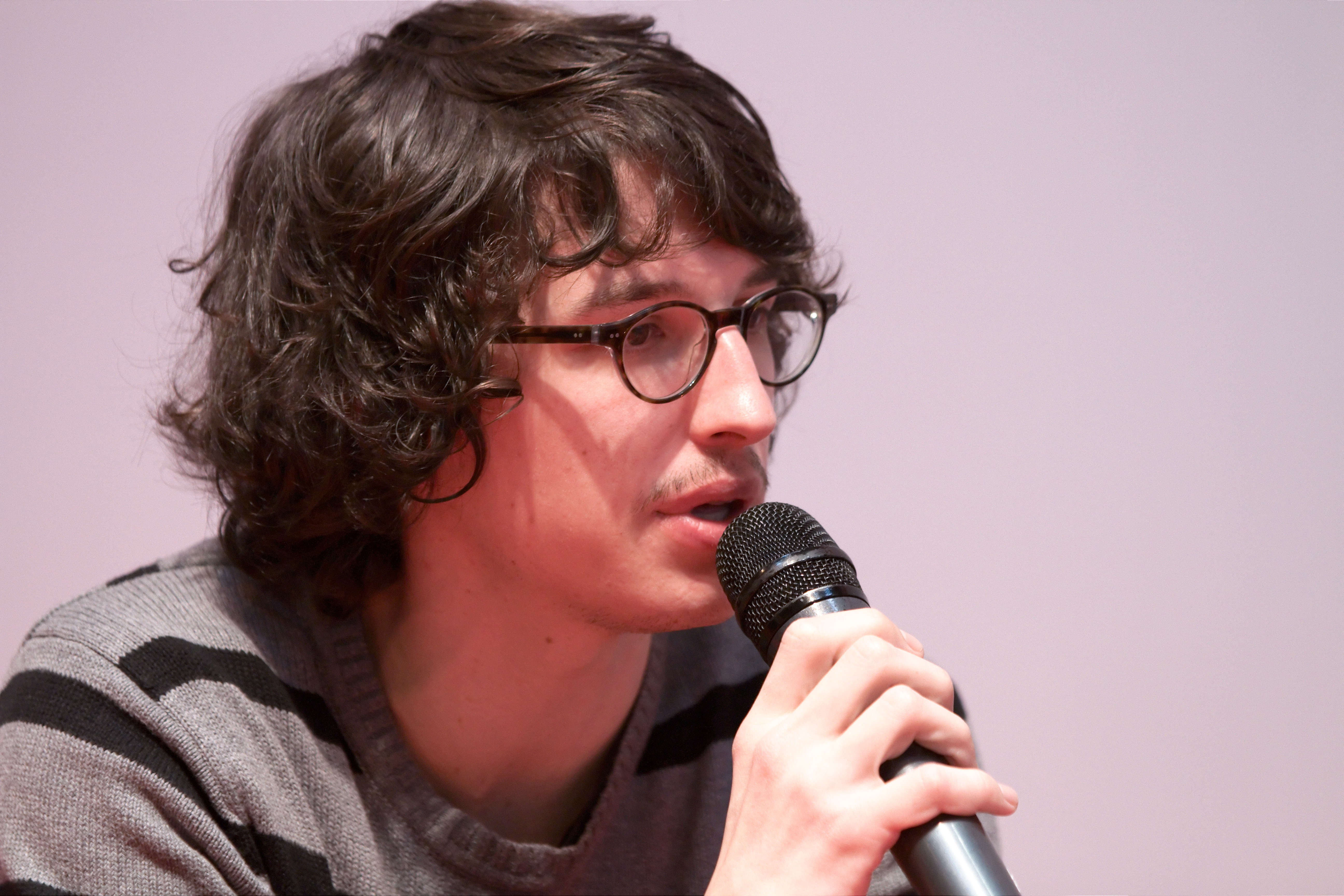 Bastien Vivès lors du Salon du livre de Paris pour un débat autour des jeunes auteurs de la collection Poisson Pilote.